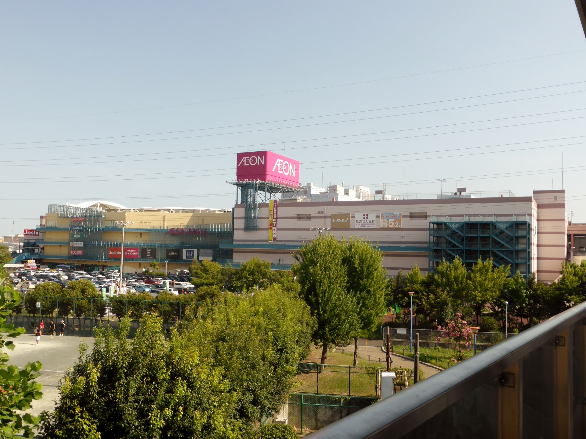 イオンモール名古屋みなとを撮影